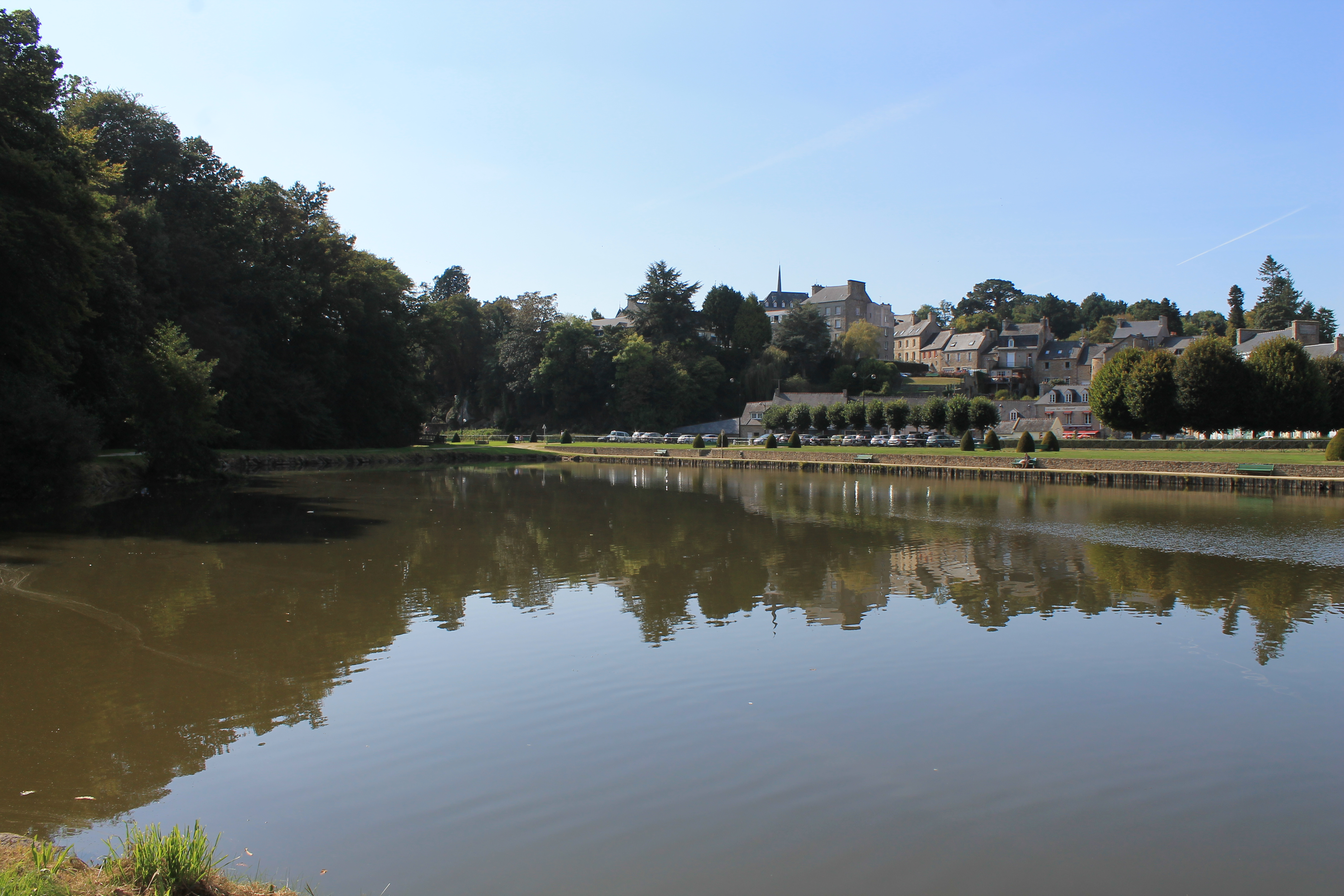 Quintin vu de l'étang